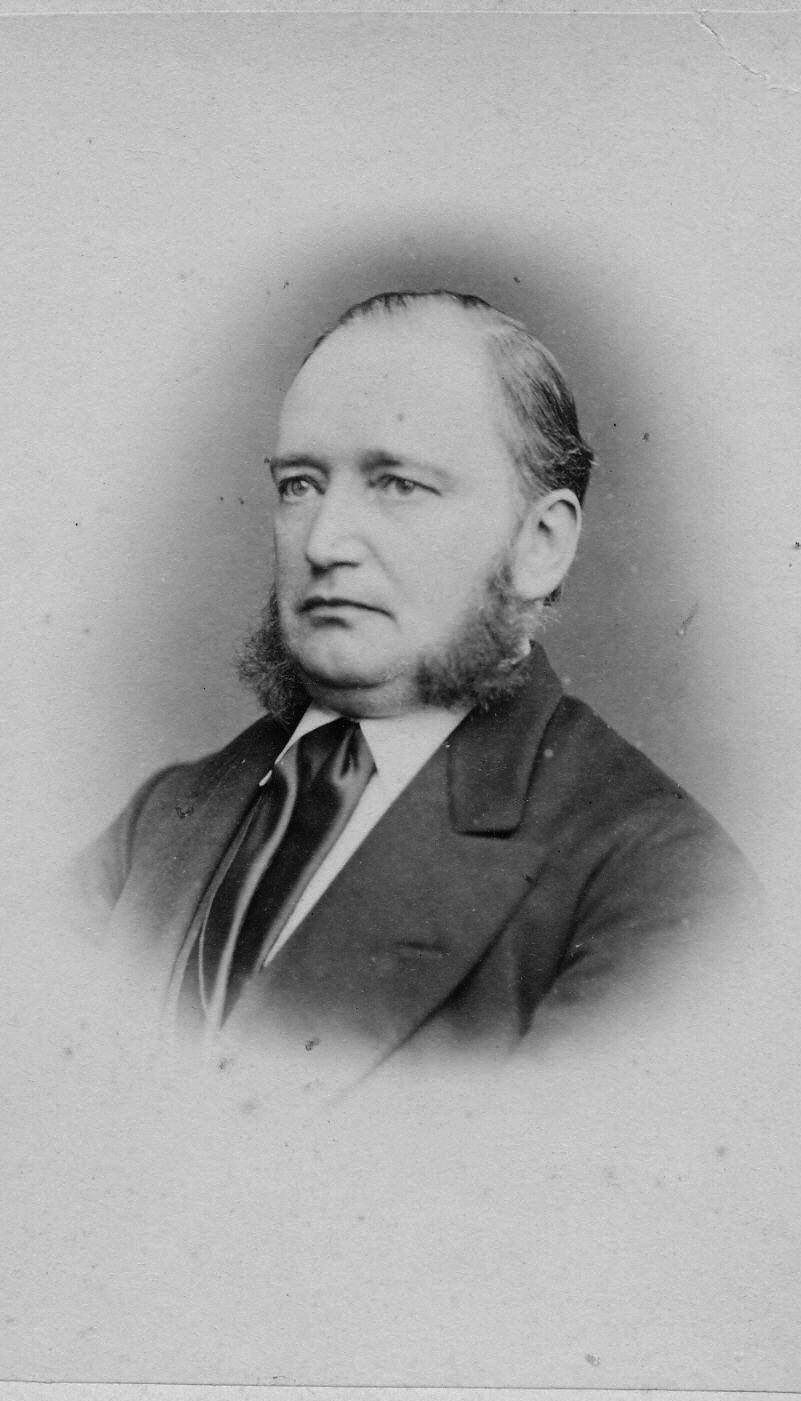 Jan Willink (1831-1896)